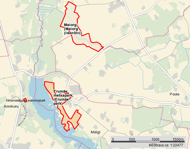 Maiorg ja Erumäe metsapark Maa-ameti kaardil.